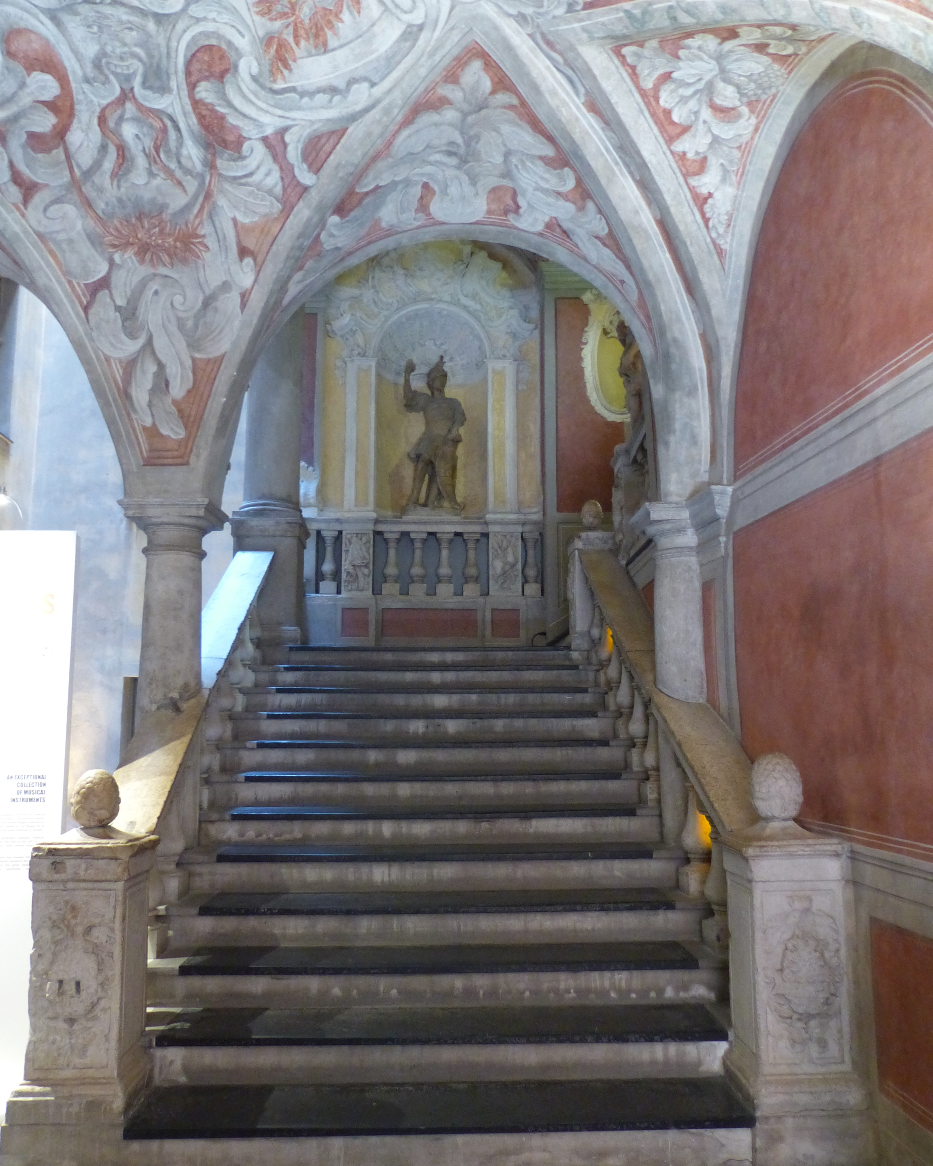 Nice (Alpes-Maritimes, France), au cœur du Vieux Nice, le palais Lascaris avec, entre autres, sa fabuleuse collection d'instruments de musique anciens, la deuxième de France.